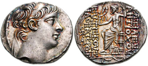 764298. Sold For $1250 SELEUKID KINGS of SYRIA. Antiochos X Eusebes Philopator. 94-92 BC. AR Tetradrachm (29mm, 16.17 g, 1h). Antioch mint. Diademed head right / BASILEWS ANTIOCOU EUSEBOUS FILOPATOROS, Zeus Nikephoros seated left; monogram above A to outer left, monogram below throne; all within wreath. SNG Spaer 2790; SMA 430; Houghton 382. Superb EF, iridescent toning.